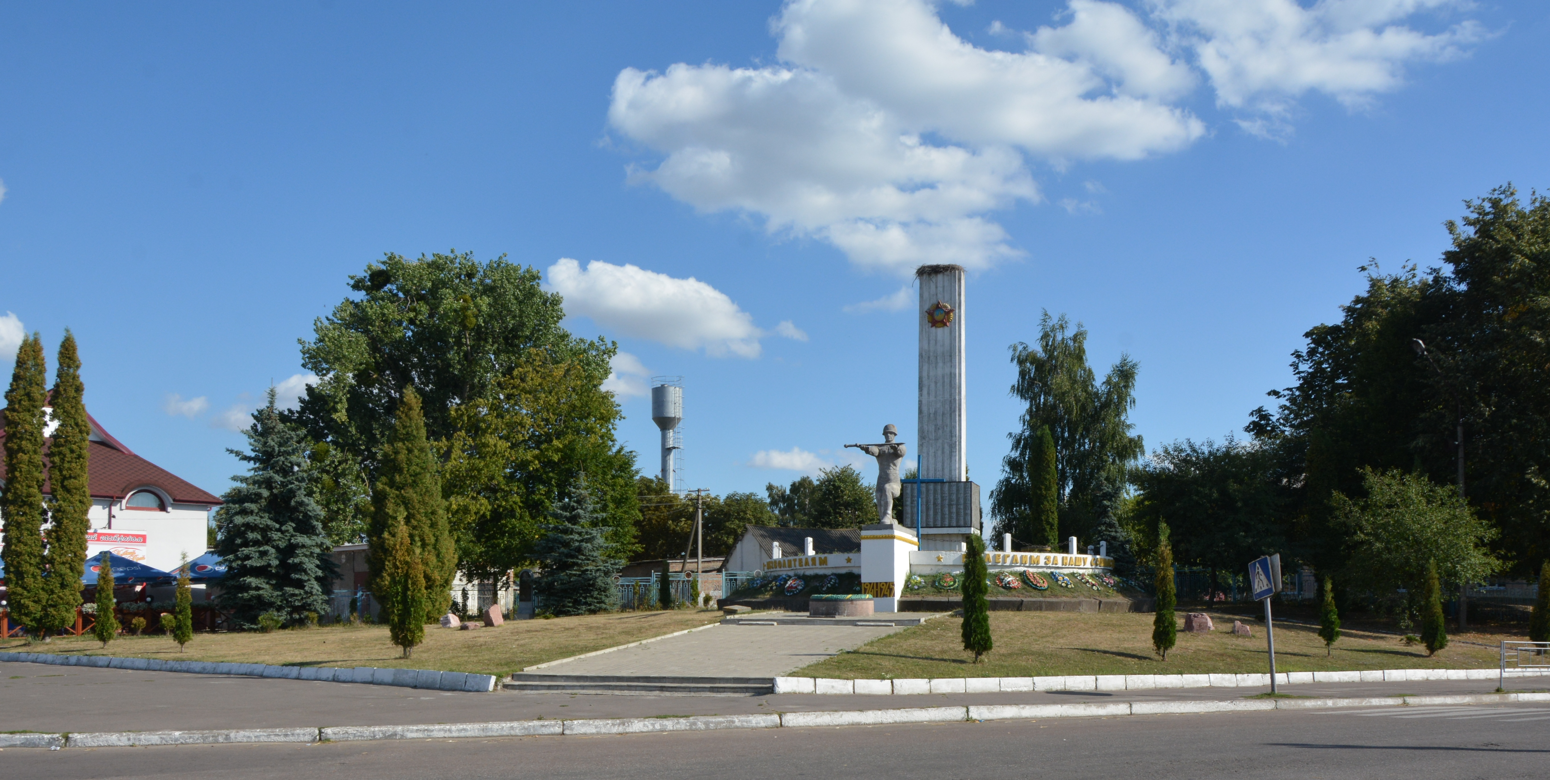 Могила братська радянських воїнів, Турійськ, вул. Володимирська